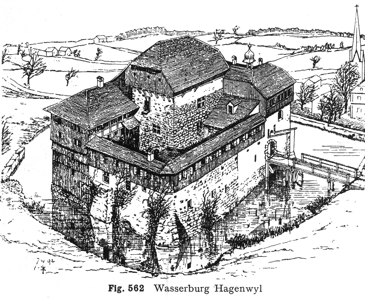 Wasserburg Hagenwil